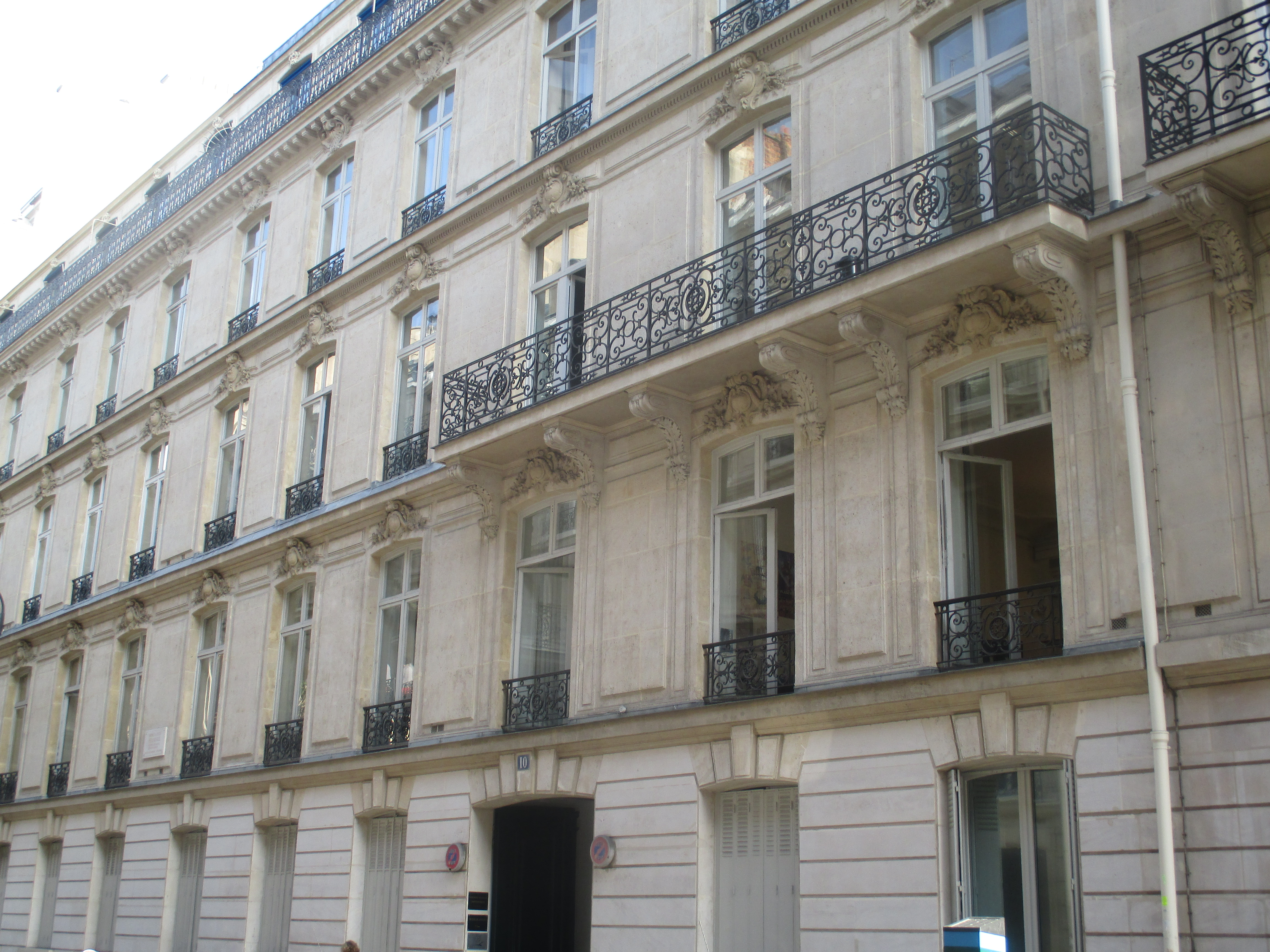 10 rue Lincoln (Paris VIIIe)